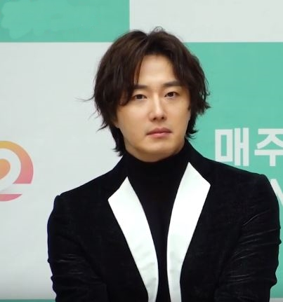 KBS2TV 예능프로그램 ‘신상출시 편스토랑’ 제작발표회가 25일 오전 서울 영등포구 KBS신관 국제회의실에서 열렸다.